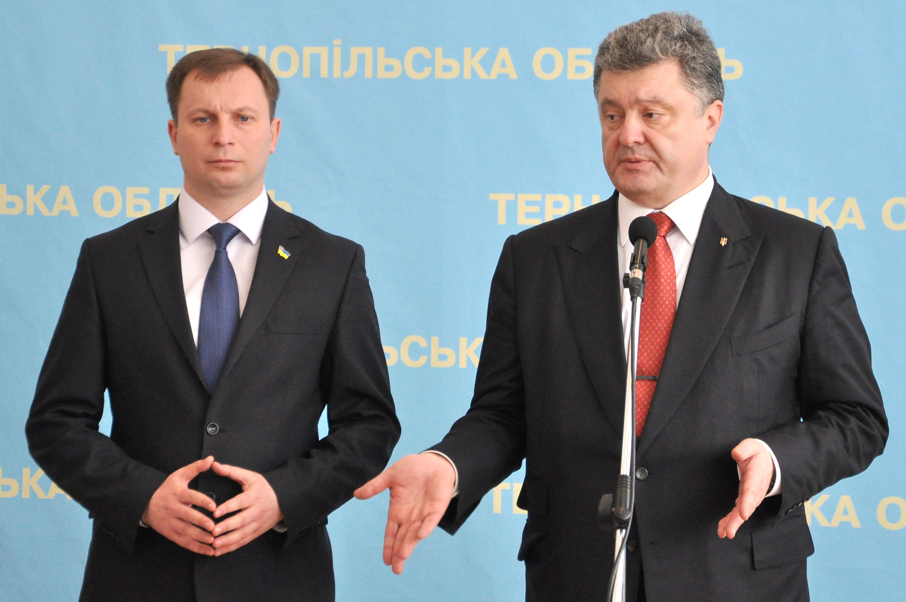 Український громадсько-політичний діяч, голова Тернопільської обласної державної адміністрації Степан Барна і Президент України Петро Порошенко під час візиту до Тернополя 2 квітня 2015 року.